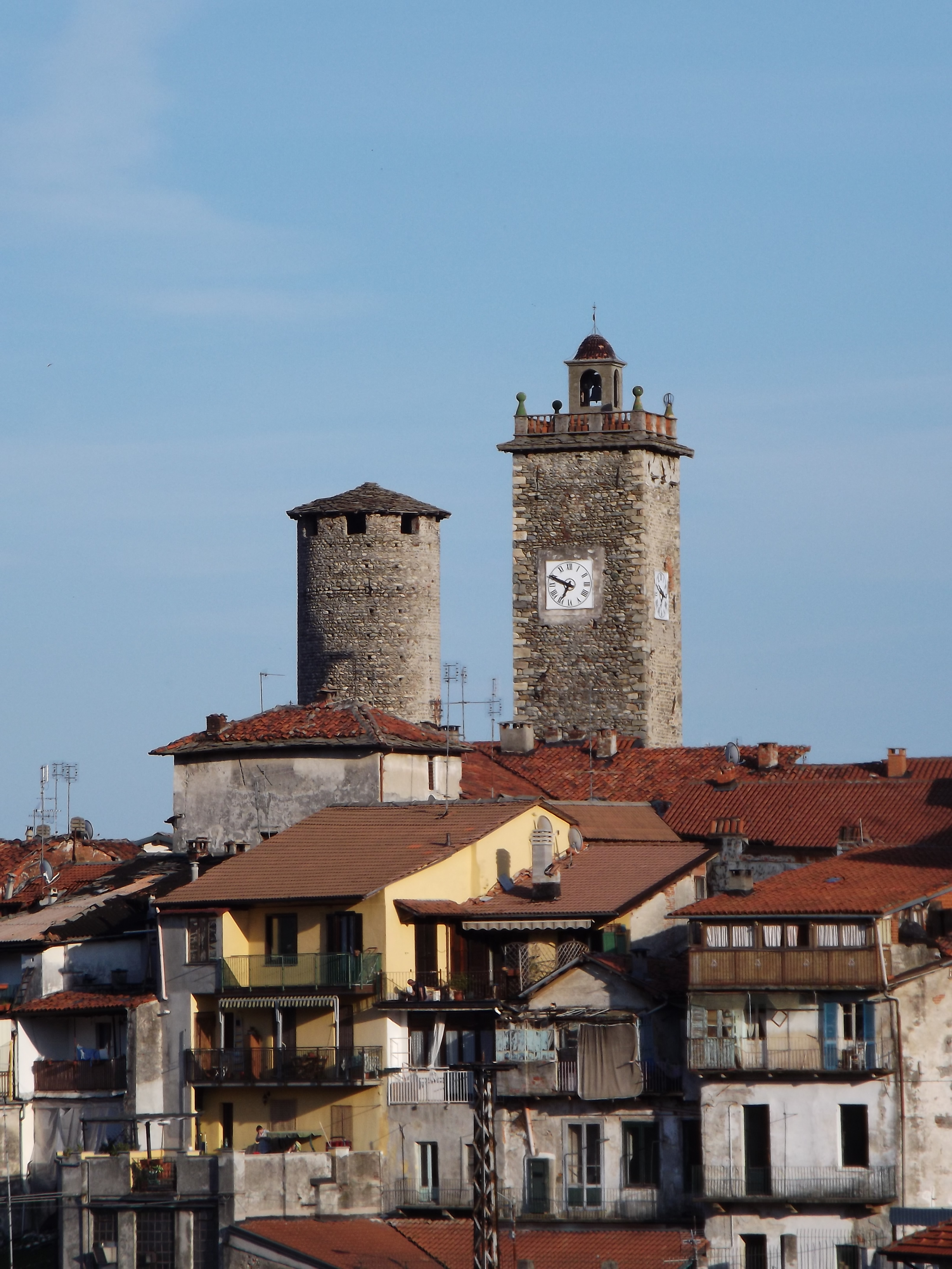 La torre di Carlevato e la torre dell'Orologio viste da nord.